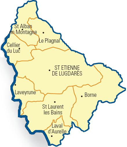 Carte détaillée des communes du canton (Ardèche)